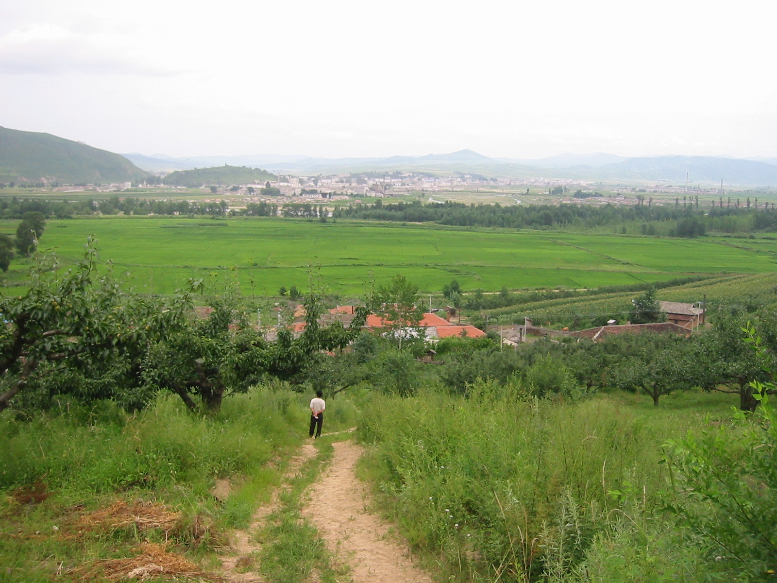 회령시(會寧市)